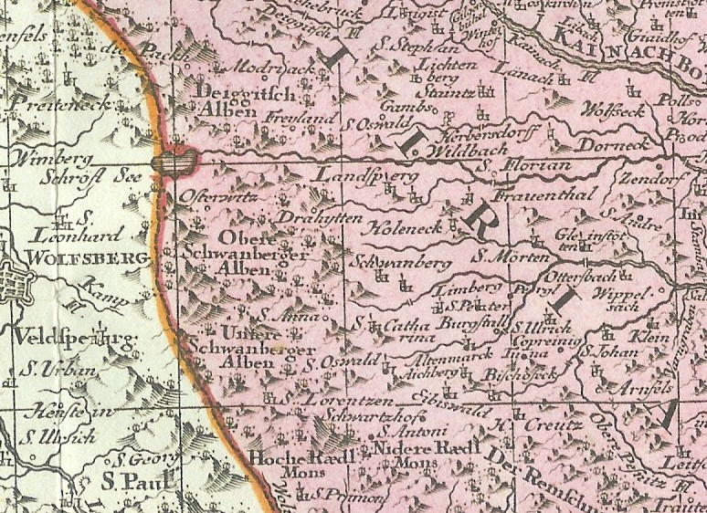 Der Schröfl See als große Wasserfläche auf der Koralm